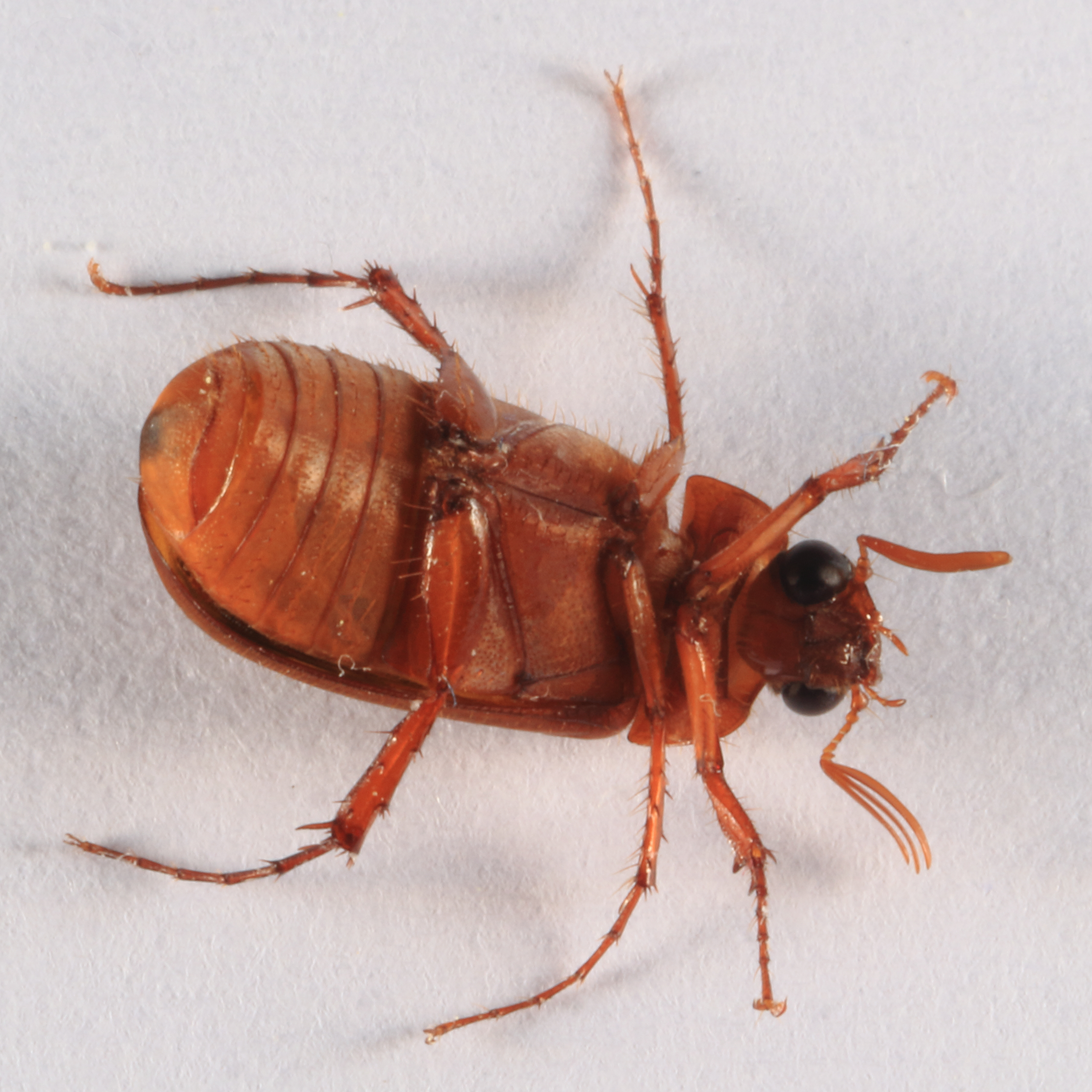 Rotbrauner Laubkäfer Serica brunnea, ca 9-10 mm Körperlänge Der abgebildete Käfer wurde am 21. Juni 2019 von Christoph auf kerbtier.de bestimmt, auf Grund meiner (Norbert) Anfrage dort vom 21. Juni 2018 The beetle shown here has been identified from Christoph on kerbtier.de 2018, June 21st, my (Norbert) question there dated 2018, June 21st